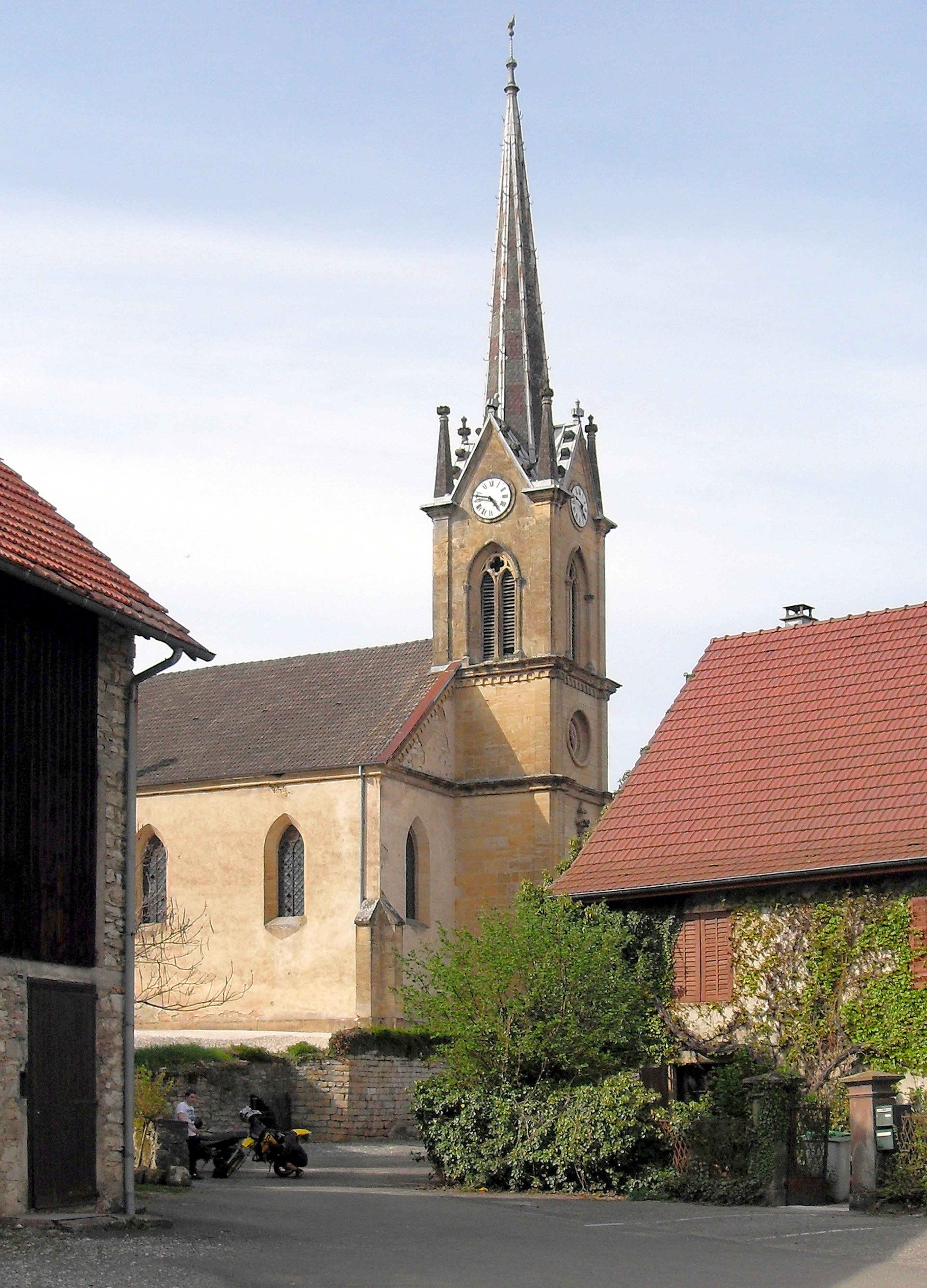 Le temple protestant d'Allenjoie